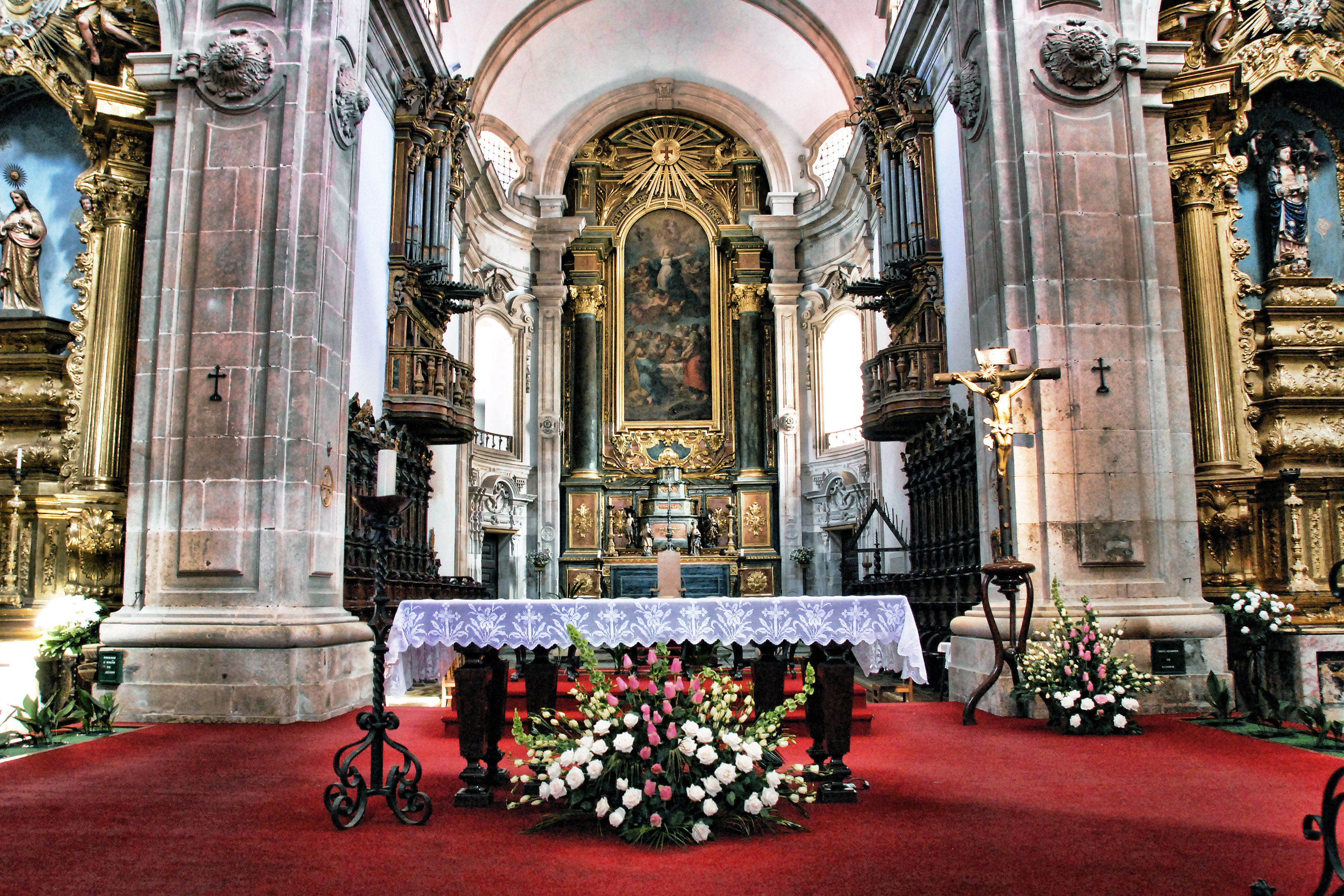 Lamego - Sé de Lamego This file was uploaded for Wiki Loves Monuments in Portugal with the unique identifier 71134.